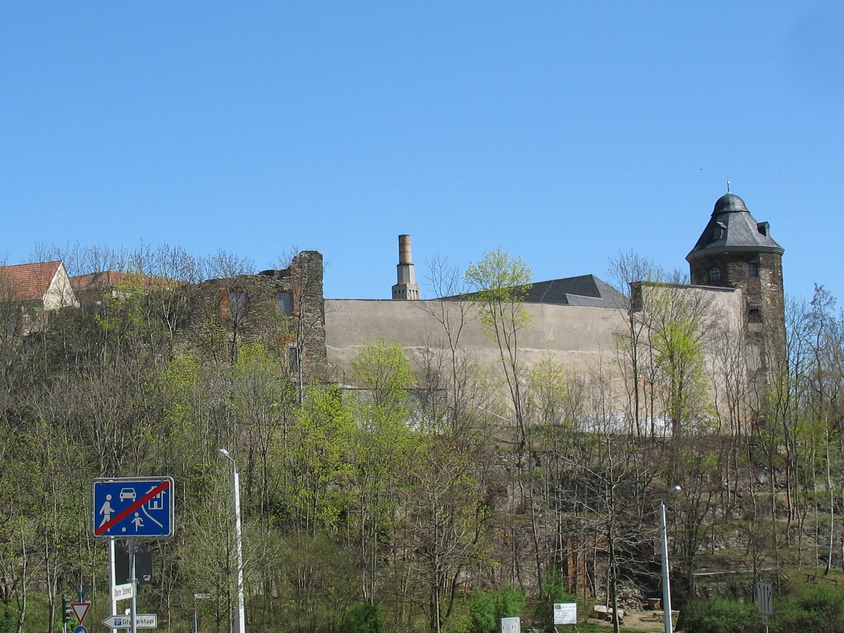 Plauen, Ruine des Schlosses der Vögte. Zu DDR-Zeiten als Justizvollzugsanstalt genutzt. Wird genutzt für den Campus der Berufsakademie Plauen (Amtsberg 10).